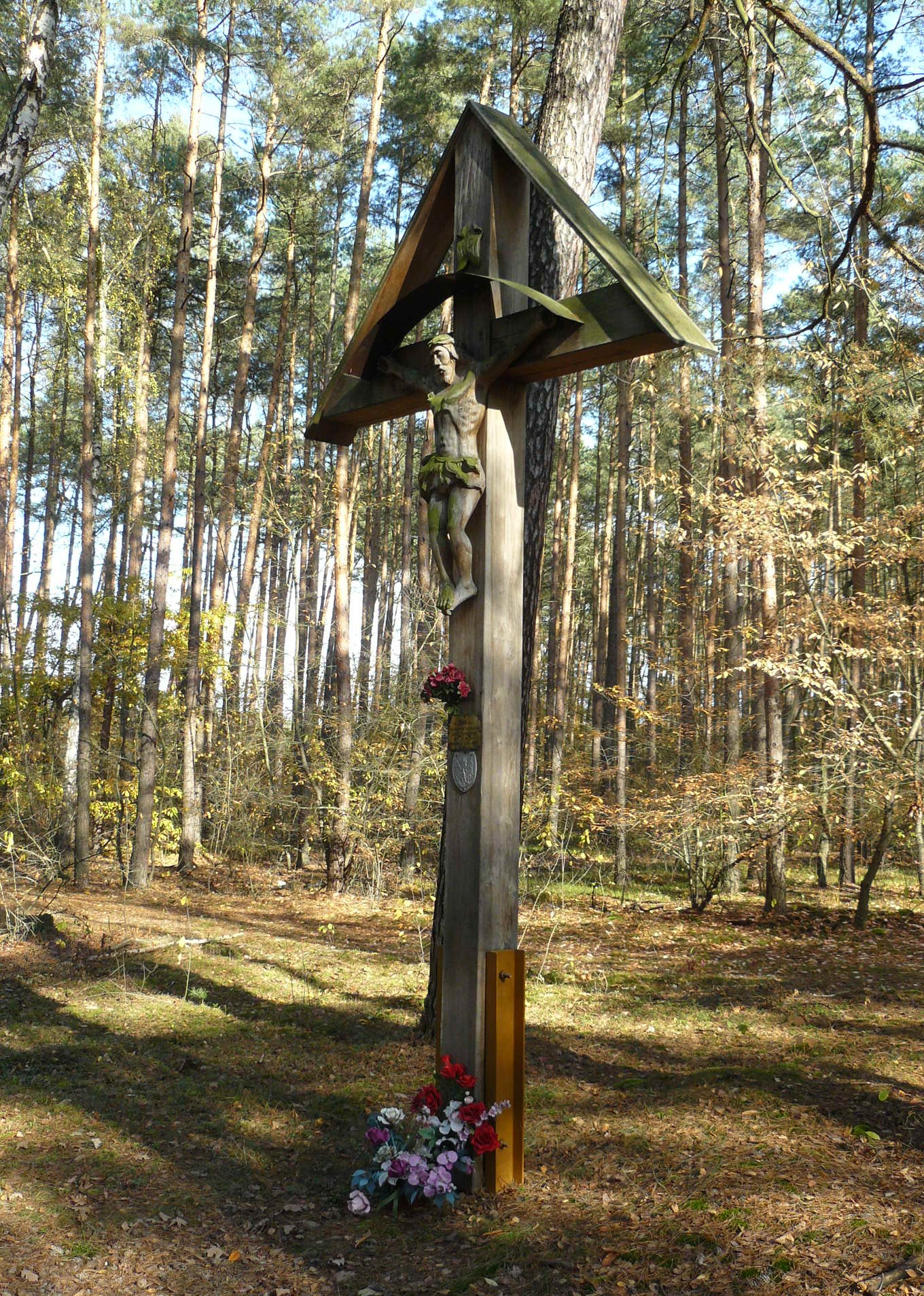 Krzyż Napoleoński - Obszar Chronionego Krajobrazu Dąbrowy Krotoszyńskie i Baszków-Rochy (okolice Konarzewa).